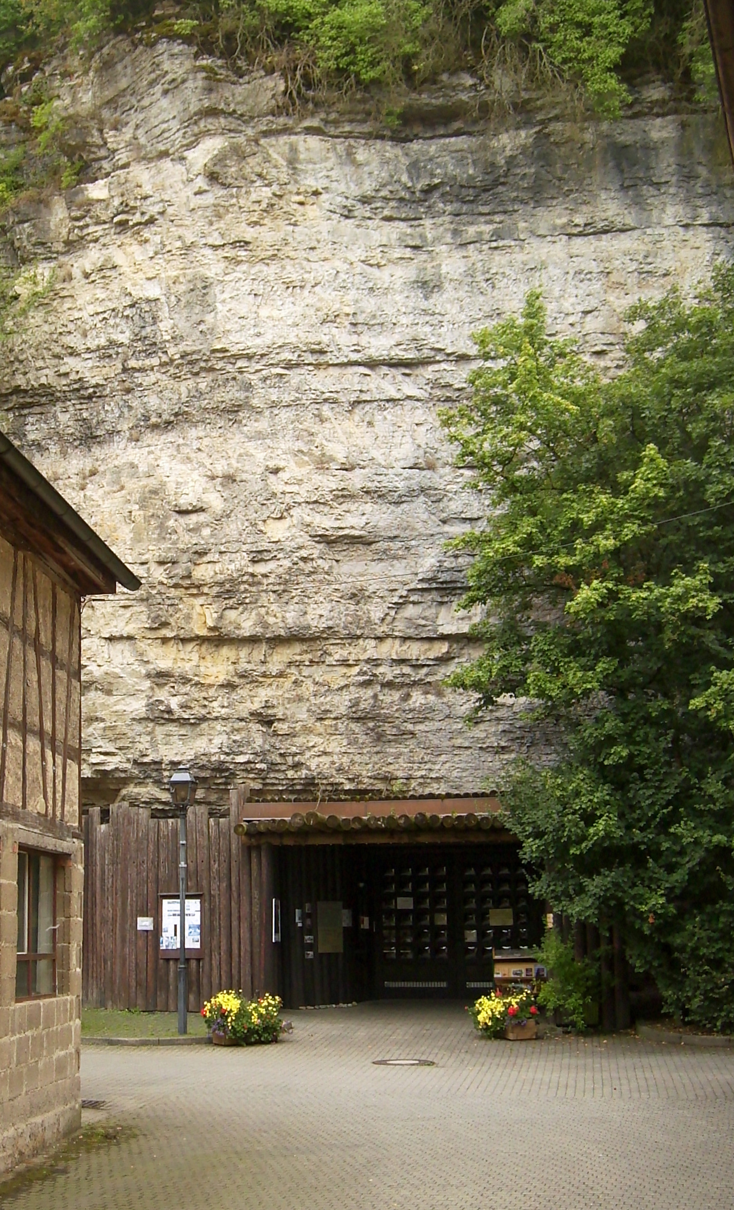 Haigerloch Eingang zum Atomkeller